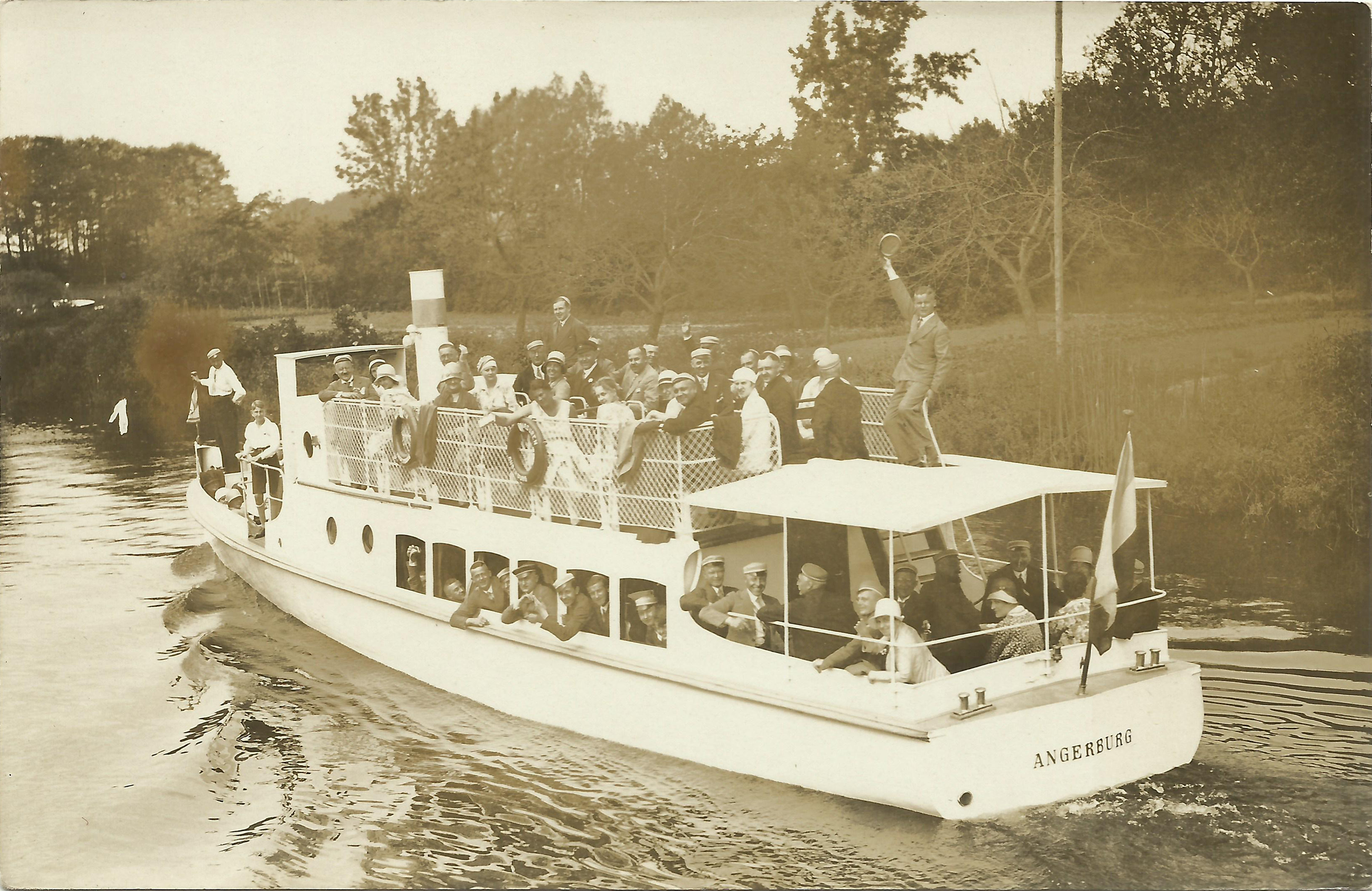 Dampferfahrt des Corps Masovia in Masuren beim 99. Stiftungsfest